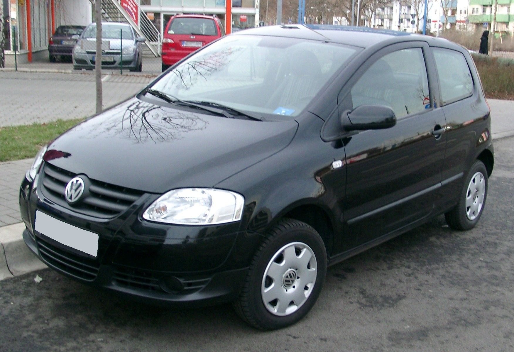 VW Fox